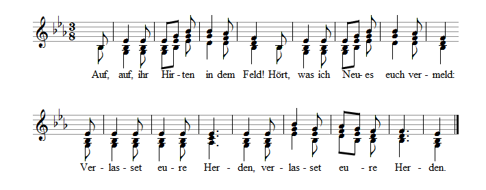 Erste Strophe des Weihnachtslieds "Auf, auf ihr Hirten in dem Feld" in traditionellem Dreigesang.